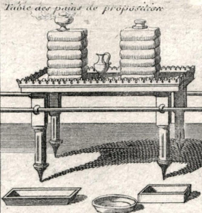 Table des pains de proposition. From: Carte du voïage des Israëlites dans le désert depuis leur sortie de l'Egipte jusqu'au passage du Jourdain, dressé par l'auteur du commentaire de l'Exode et / exécutée par Liébaux, géografe.